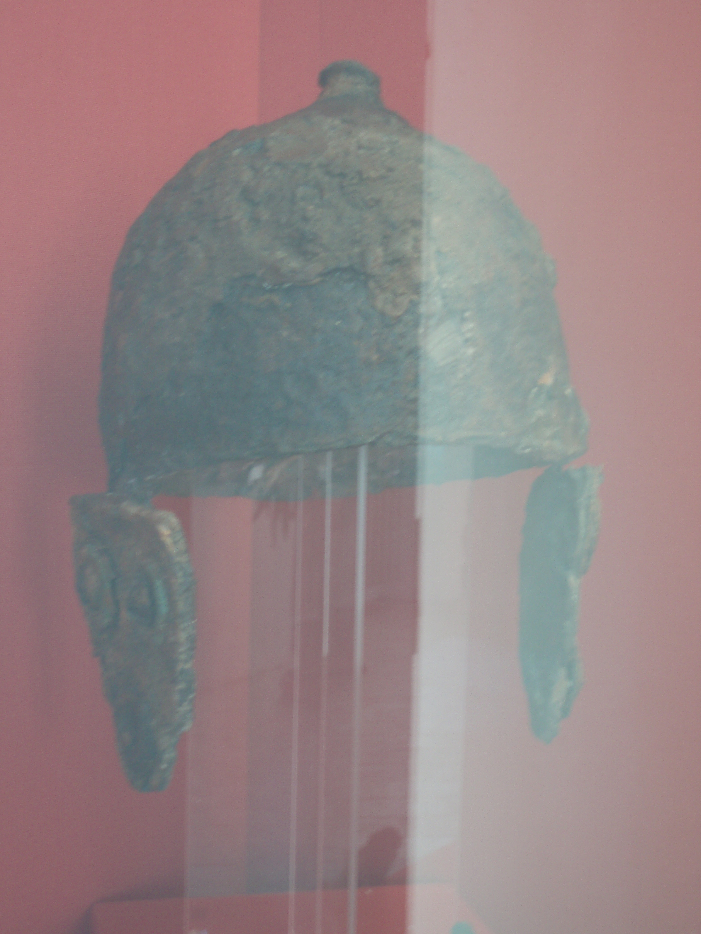 Elmo di Montefortino (the original one), Museo archeologico statale di Arcevia - 4